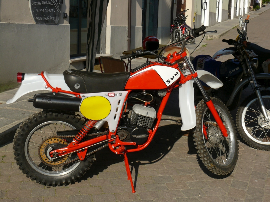 Cavalcata SWM del 12/07/2015 a Santa Maria della Versa (PV).